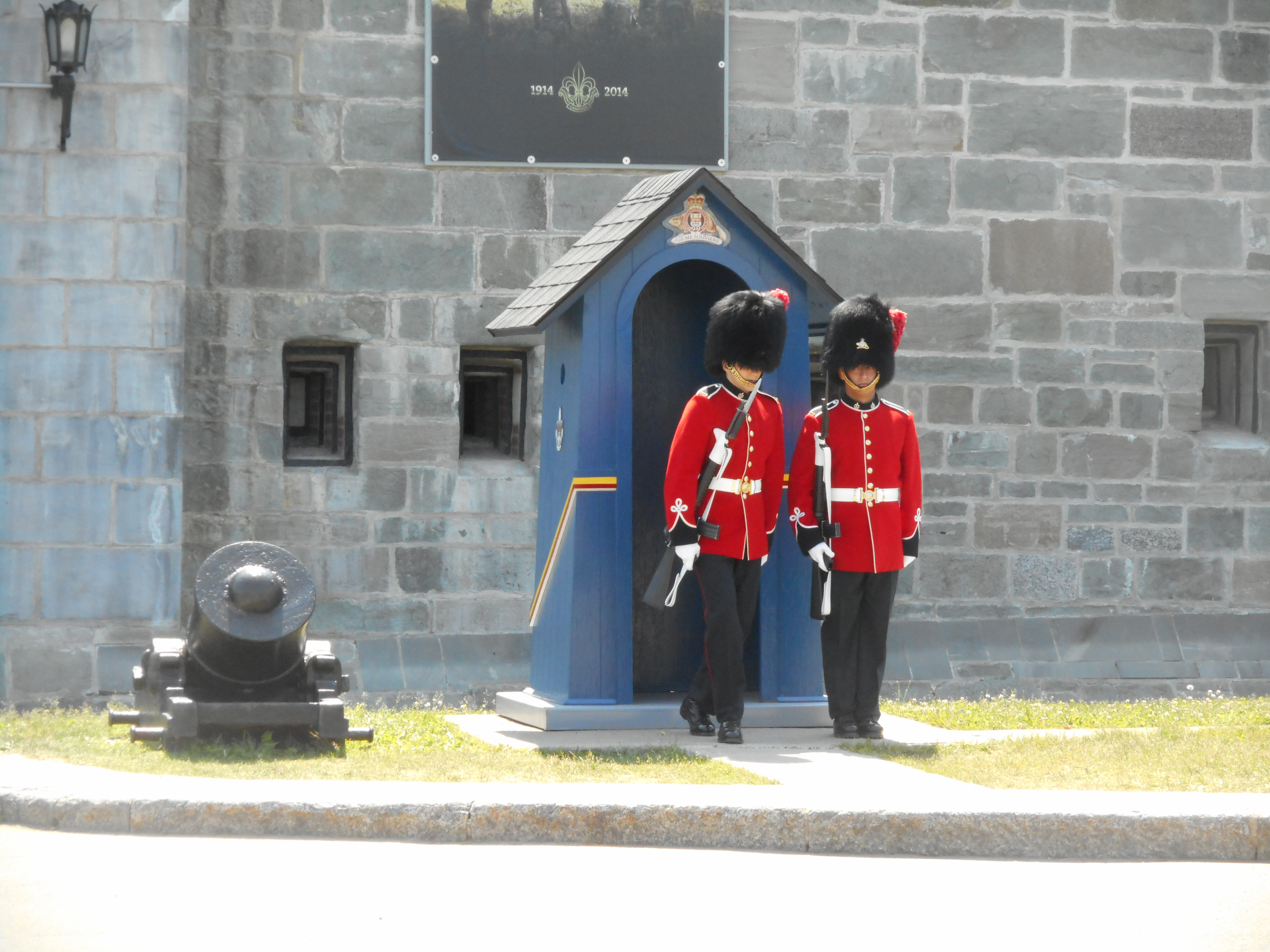 Changement de sentinelles à l'entrée de la Citadelle de Québec